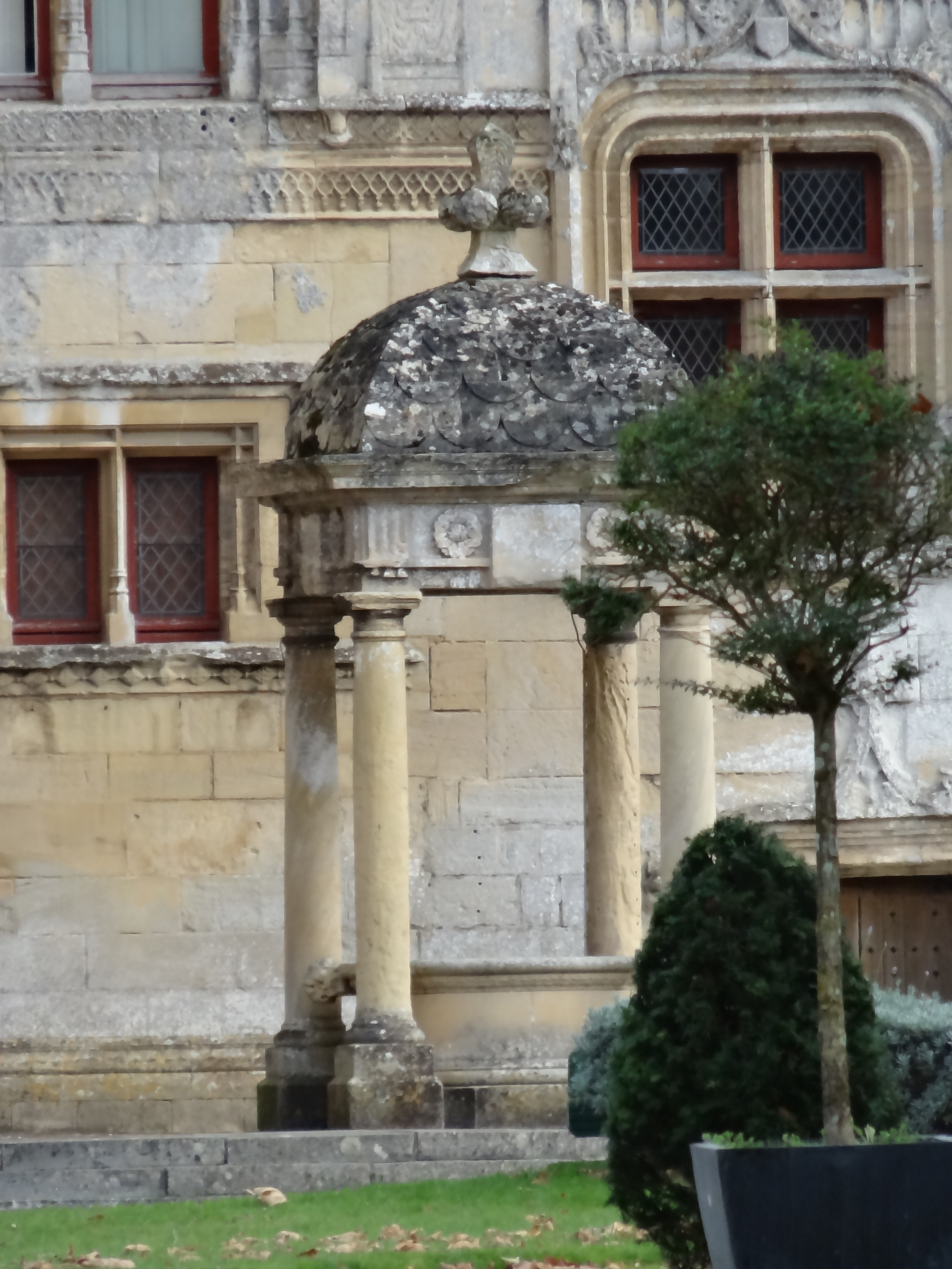 puits style Renaissance dans la cour du château de Fontaine-Henry dans le Calvados